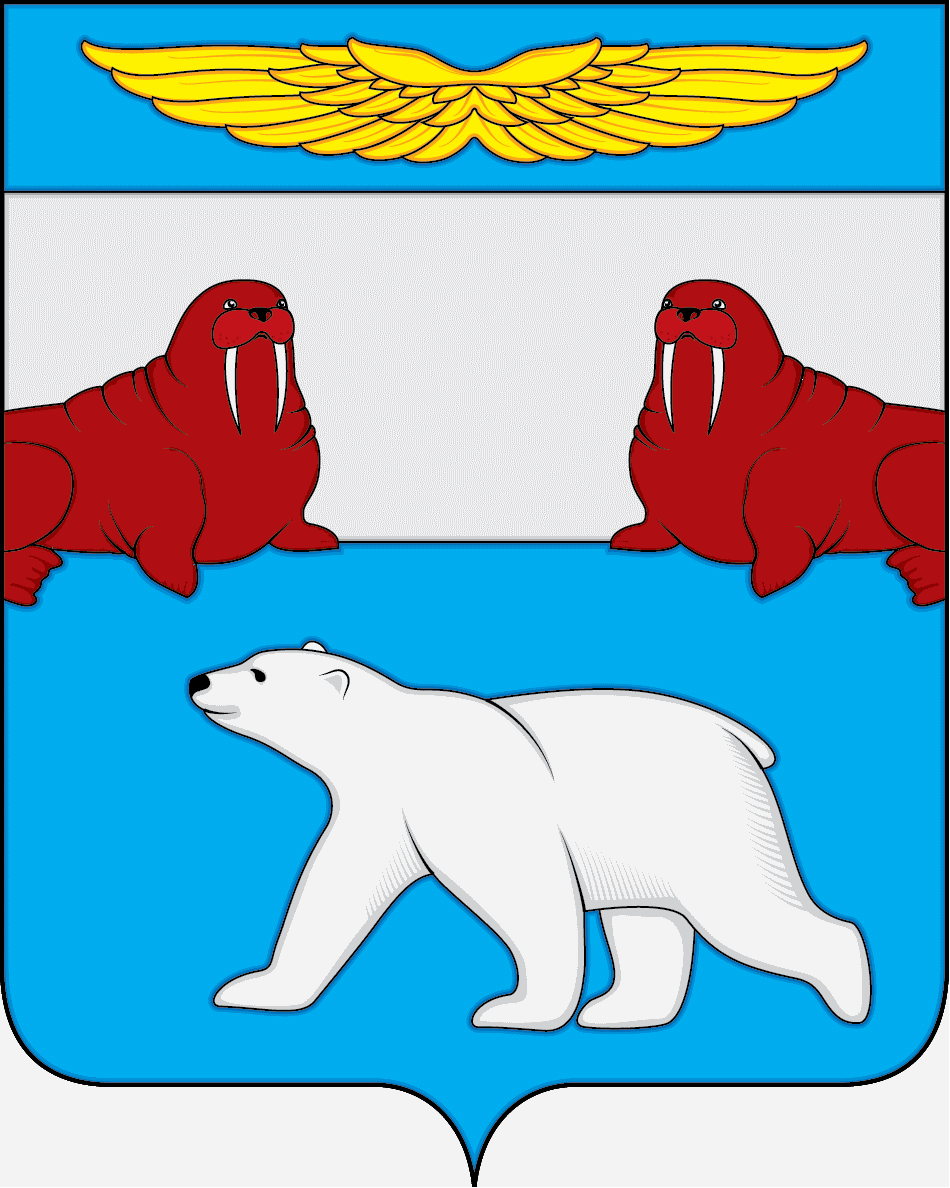 Герб посёлка Амдерма